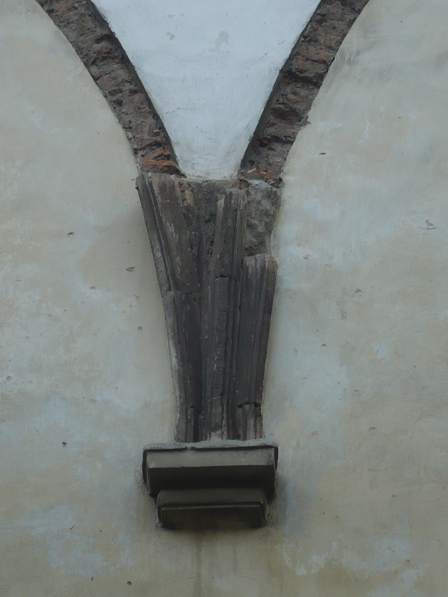 Lwów. Synagoga Złota Roża